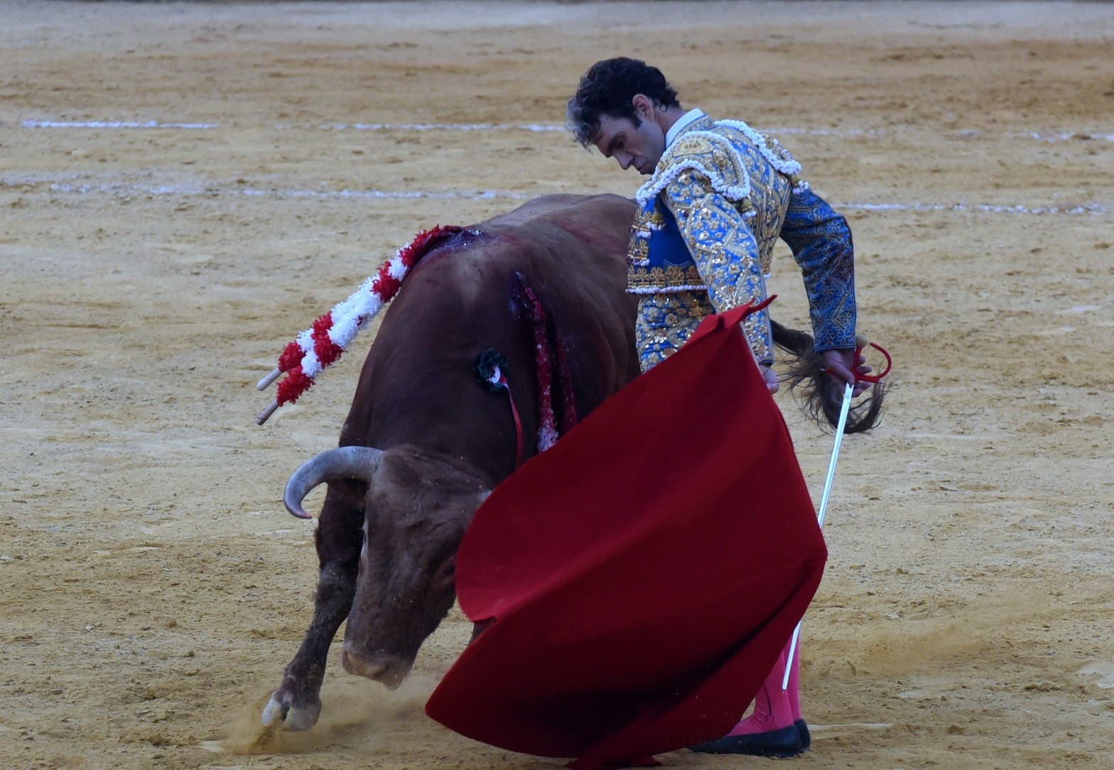 La posición invertida de la mano indica que este natural sigue a una trincherilla, cargando la suerte con el cuerpo entero en situación de riesgo y dominio.